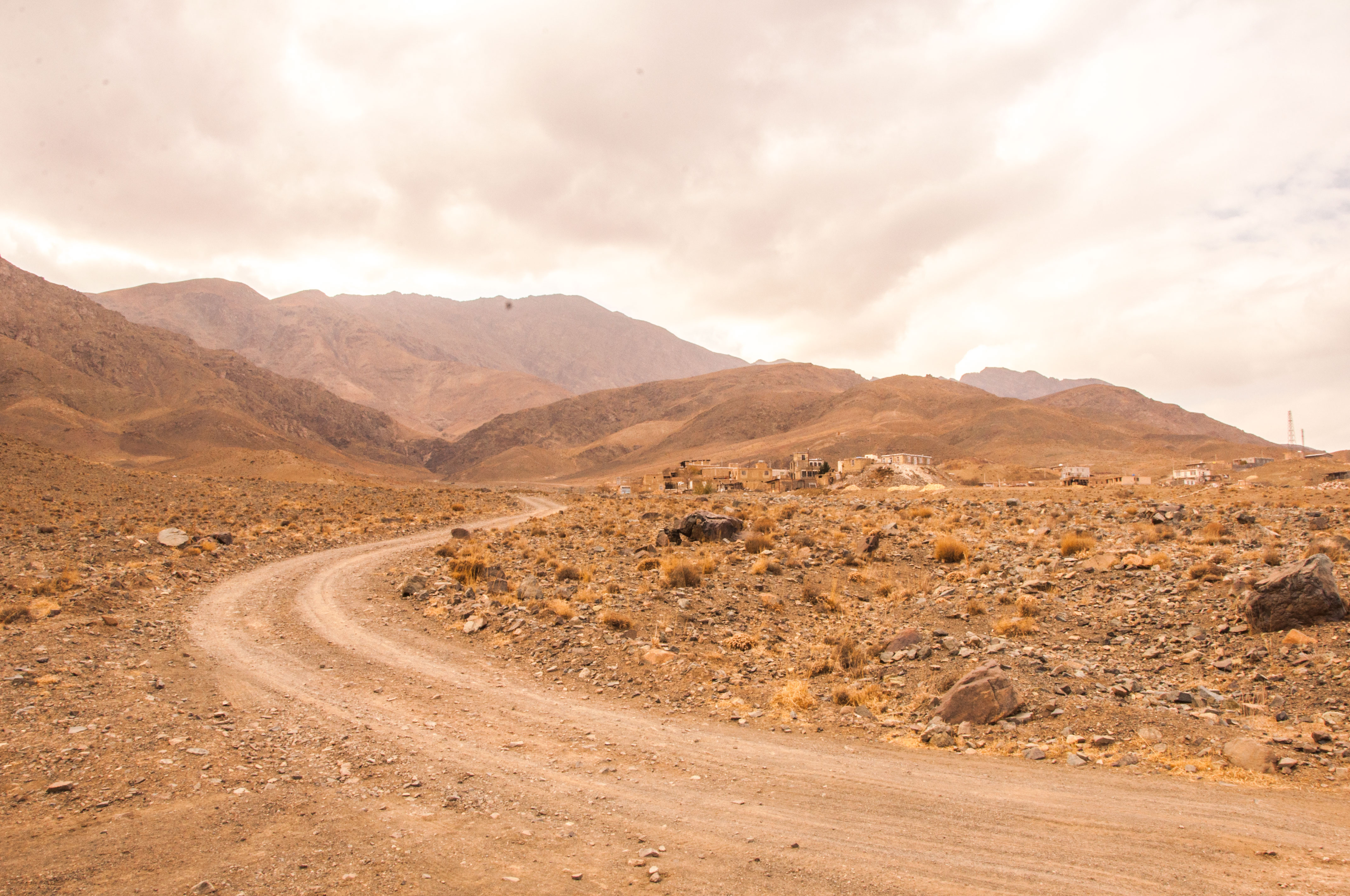 منظره ای زیبا از روستای جزه